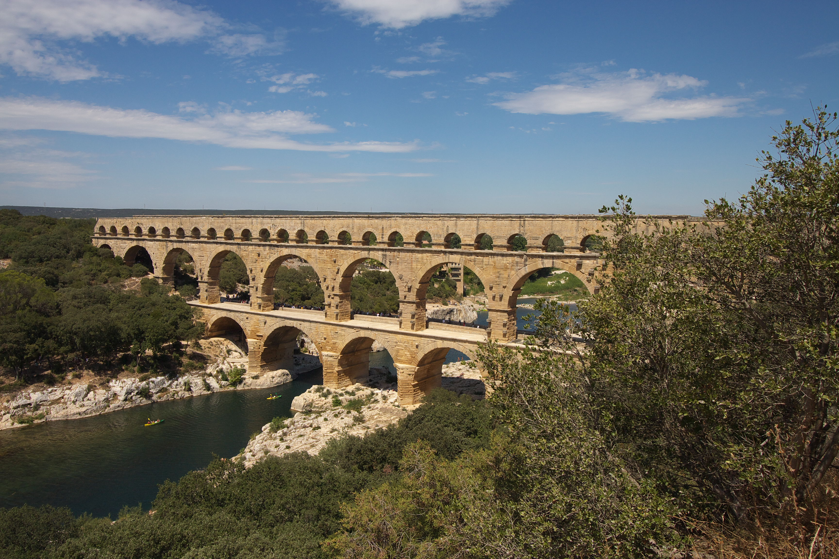 Pont du Gard / ポン・デュ・ガール